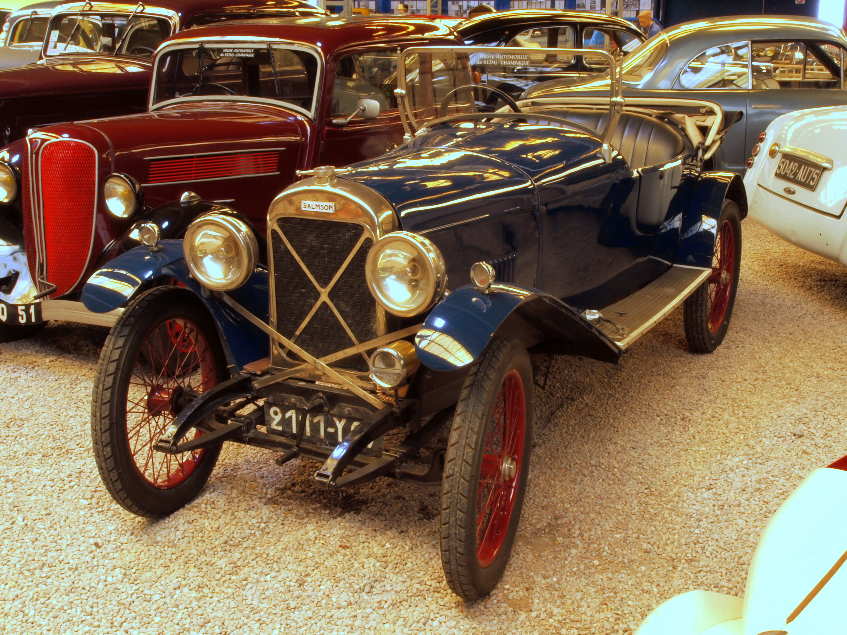 1923 Salmson VAL 3